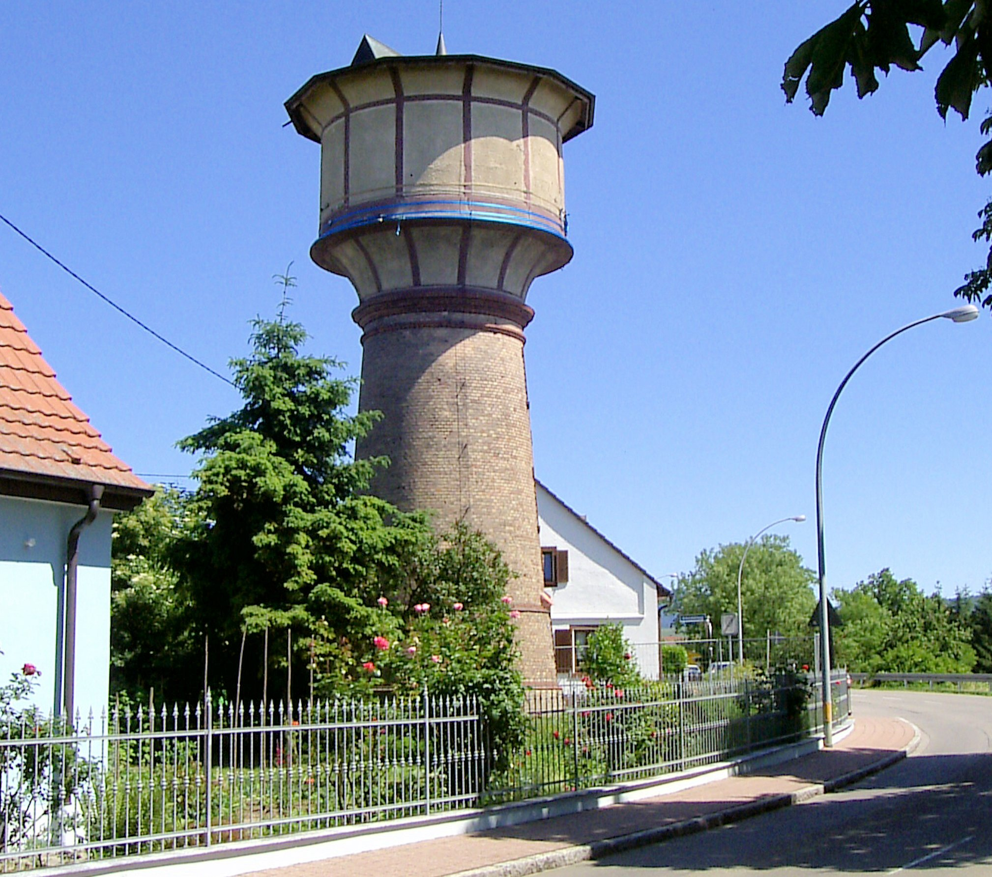 Wasserturm in Neuenburg am Rhein, 1901 erbaut